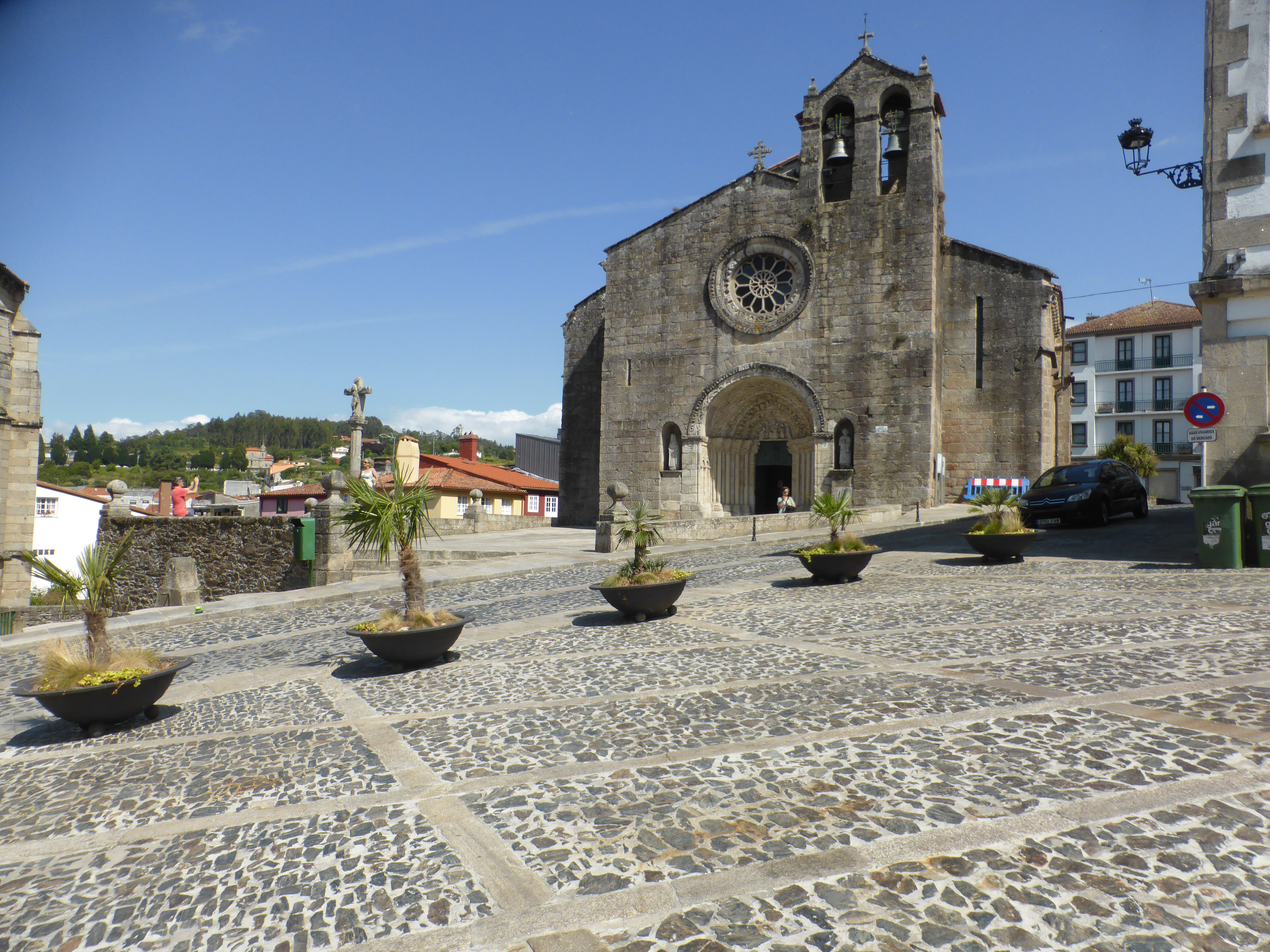 Estilo gótico, del siglo XIV. Iglesia Parroquial de Santa María de Azogue. Monumento Nacional y Bien de Interés Cultural.